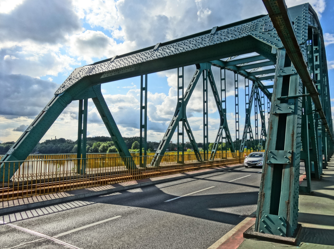 Most fordoński im. Rudolfa Modrzejewskiego nad Wisłą w Bydgoszczy-Fordonie